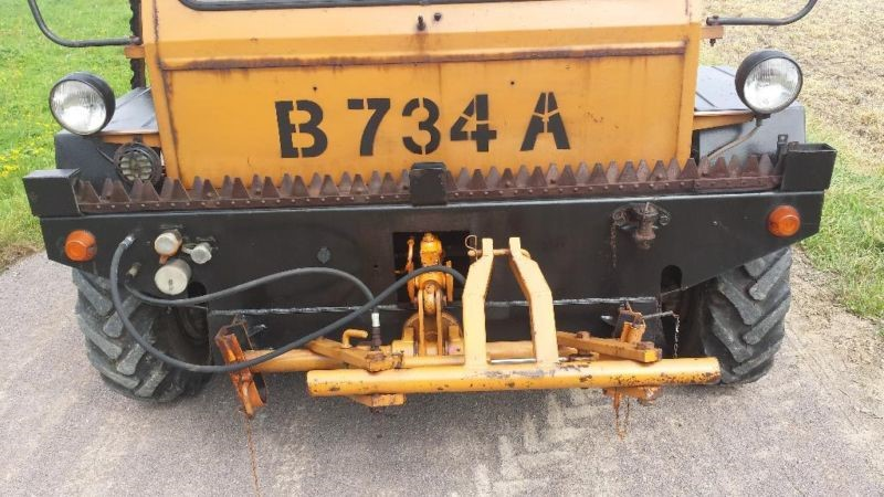 Aufnahme Frontgeräte